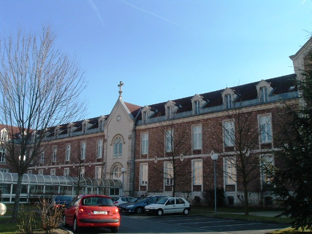 Les hospices Galignani de Corbeil-Essonnes (91).